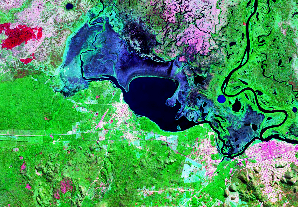 Mapa satelital de la laguna Cáceres Bolivia, ademas de las manchas urbanas de las ciudades de Puerto Suárez (Bolivia) y Corumbá (Brasil).